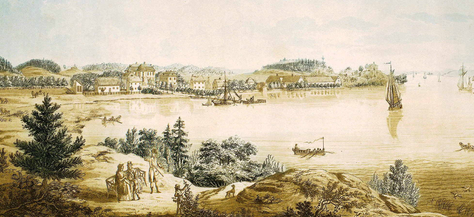 Sturehov: Utsnitt ur akvarellerad konturetsning av Martin Rudolf Heland, vy från öster